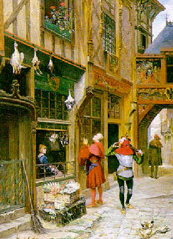 L'Archer amoureux